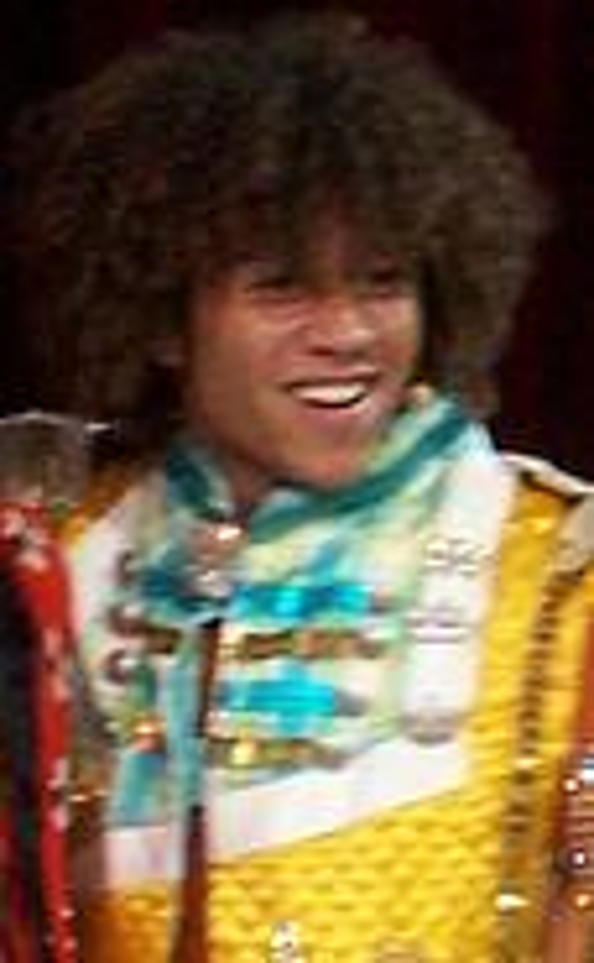 Portrait de Corbin Bleu